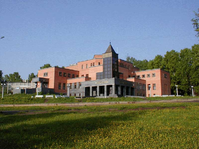 Сбербанк (Кирово-Чепецк)